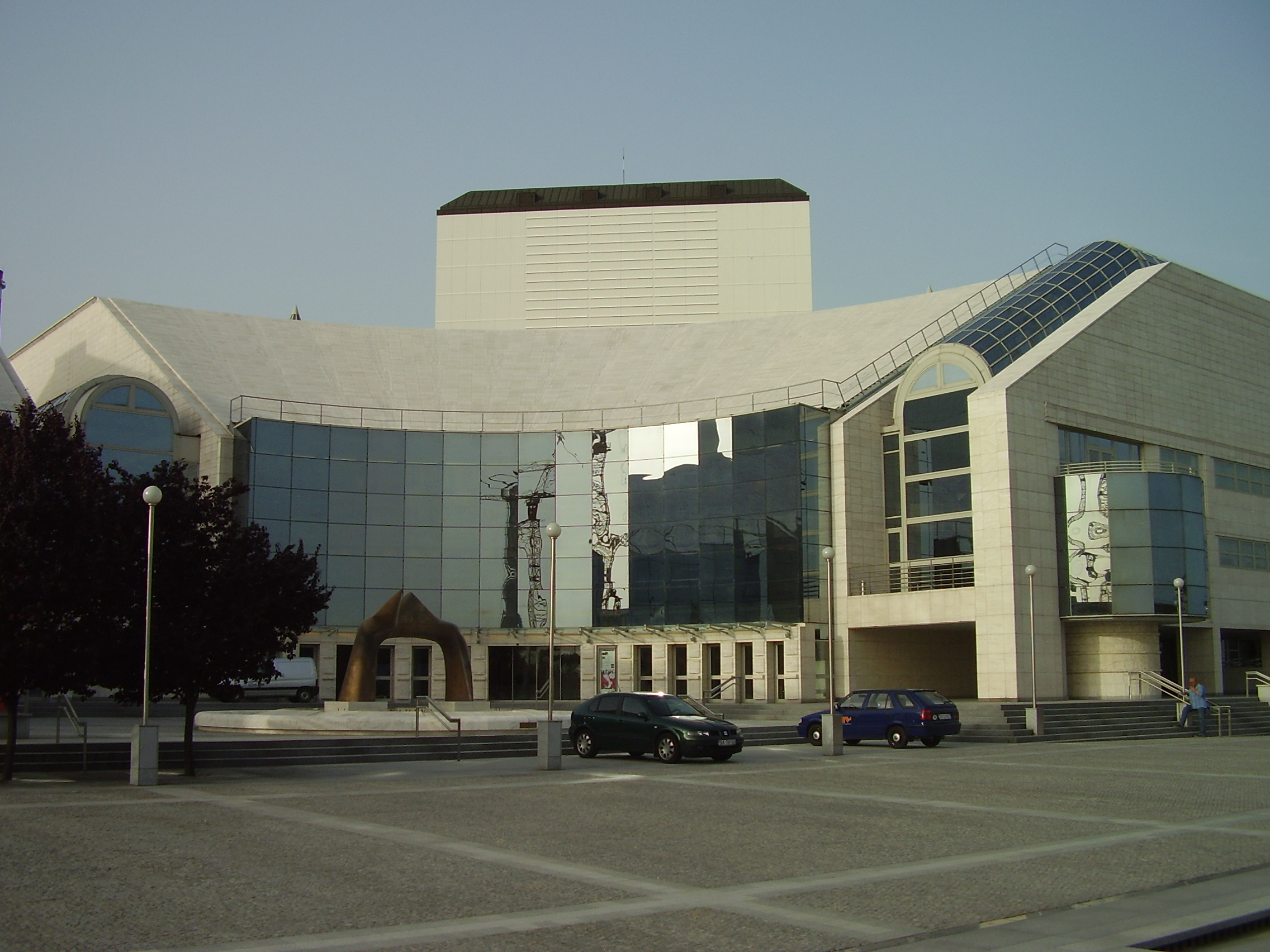 Bratislava